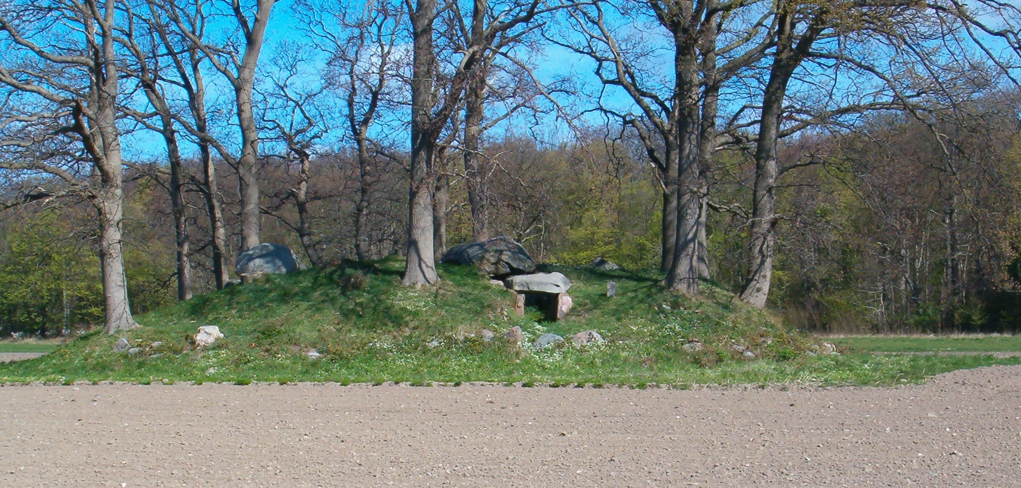 Store Guldhøj, en stor jættestue på marken lige uden for Frejlev Skov